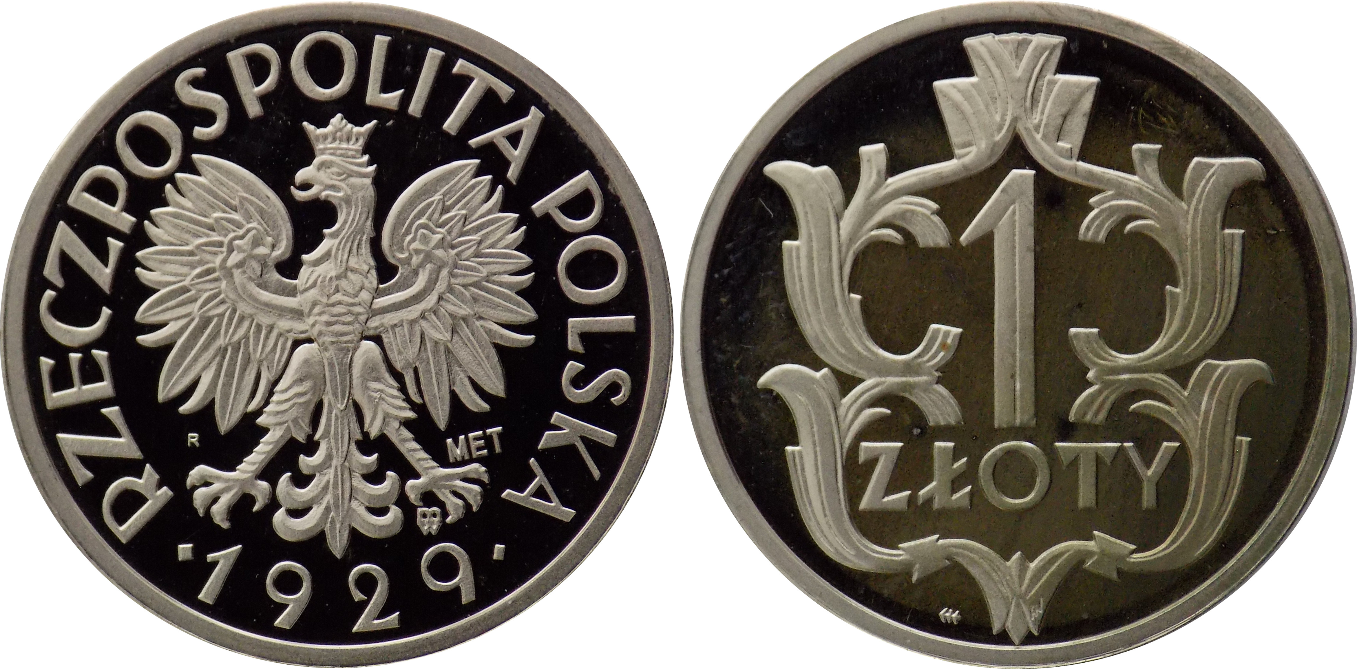 Replika 1 złoty 1929